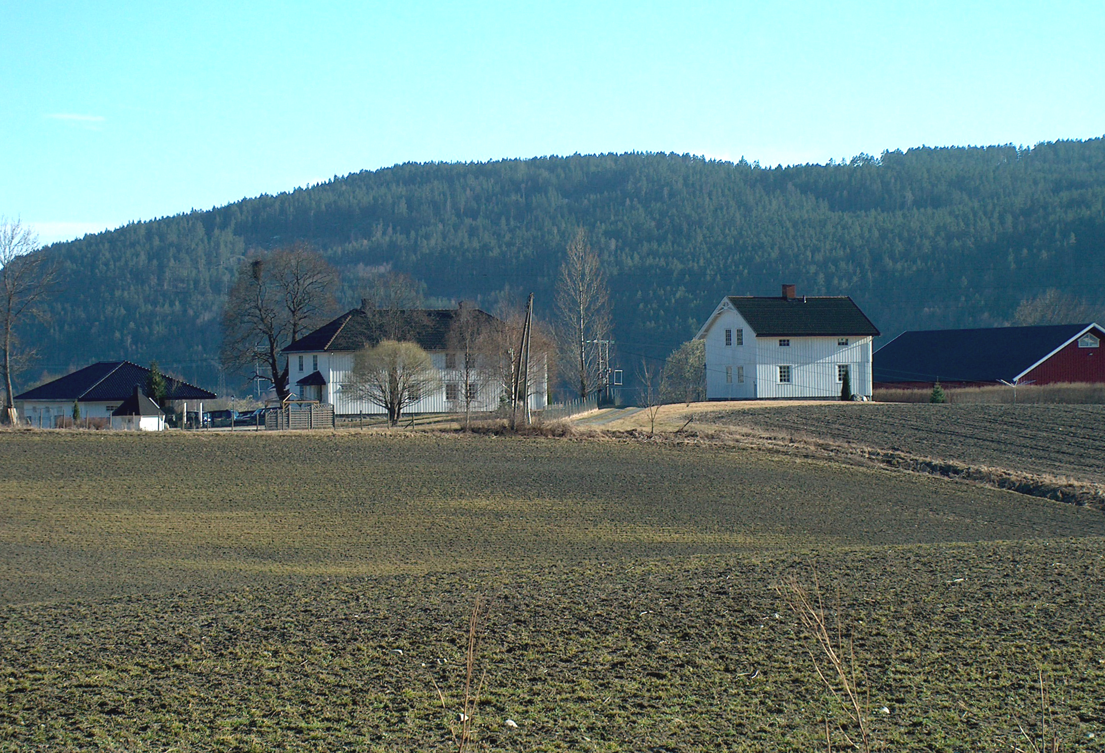 Nøkleby gård i Ytre Soknedalen